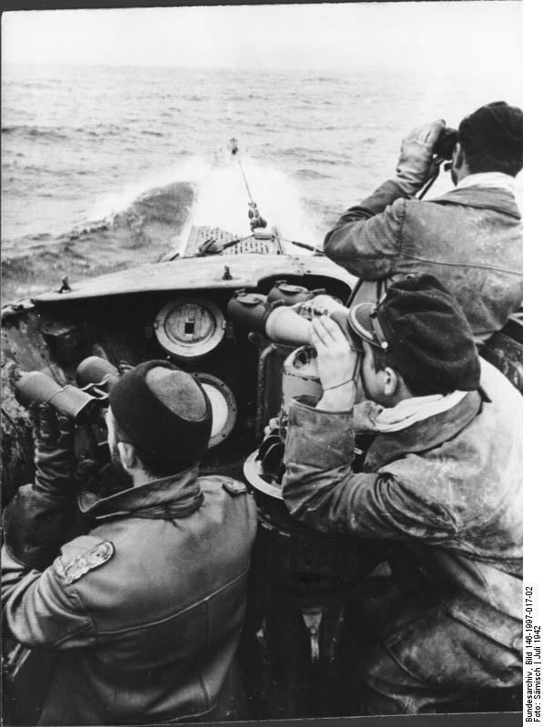 Auf U-Boot Jagd Aufmerksam wird die Rauchwolke in 320 Grad avisiert: Tanker oder Kriegsfahrzeug? PK-Aufn: Kriegsberichter Sämisch-Atlantic, 16.7.42 [Herausgabedatum]